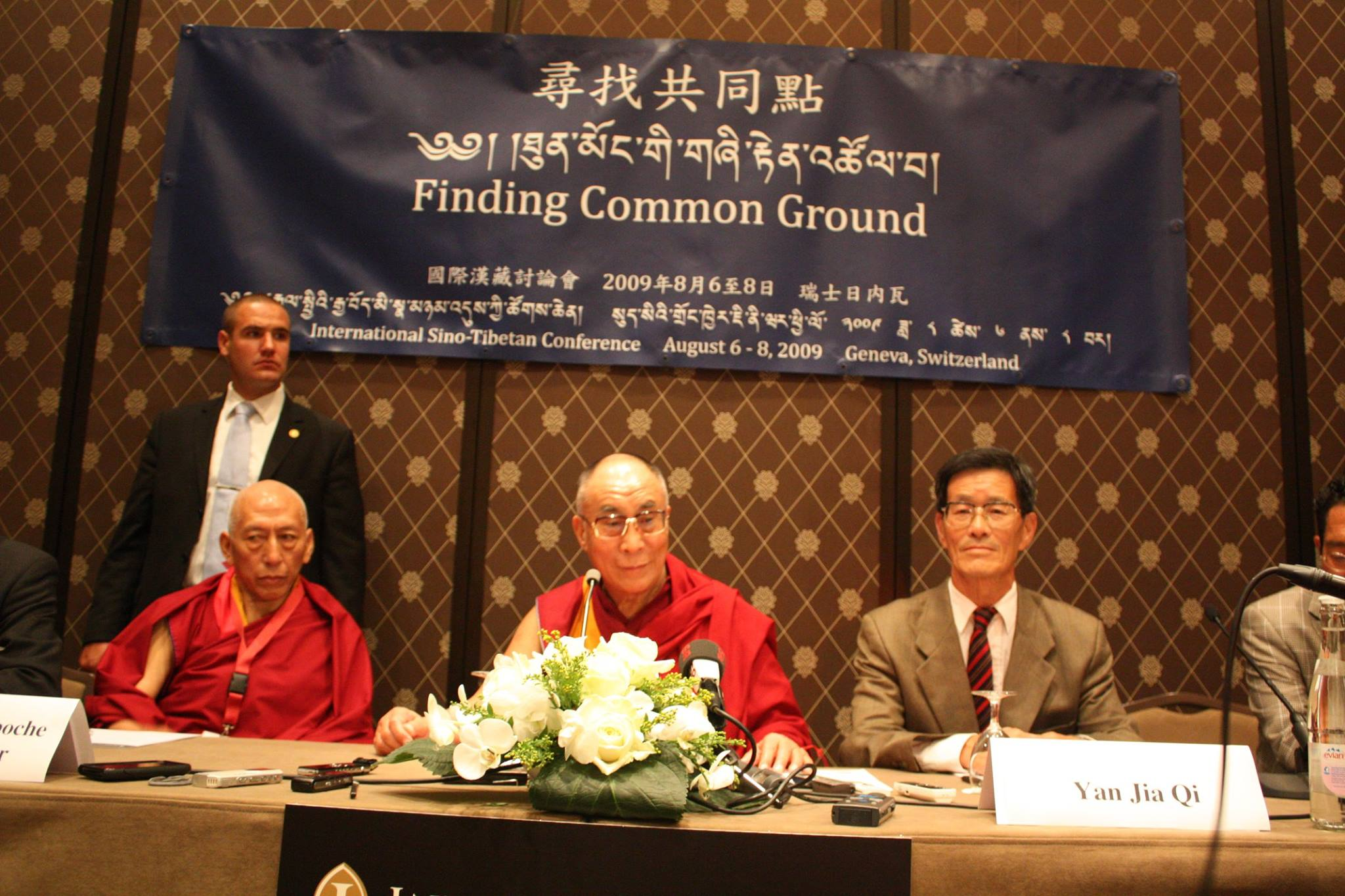 S Rinpoche 26